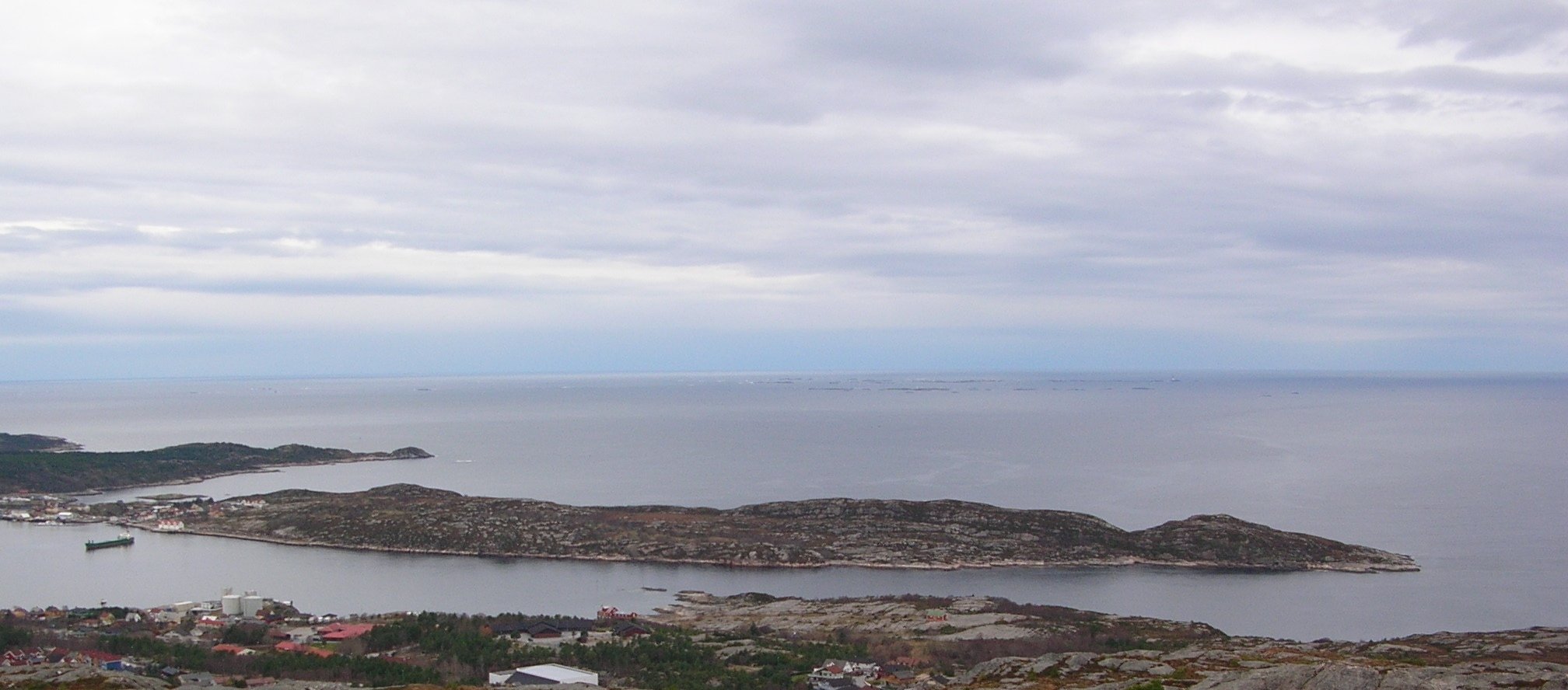 The Island Skorpa in Kristiansund, Møre og Romsdal, Norway